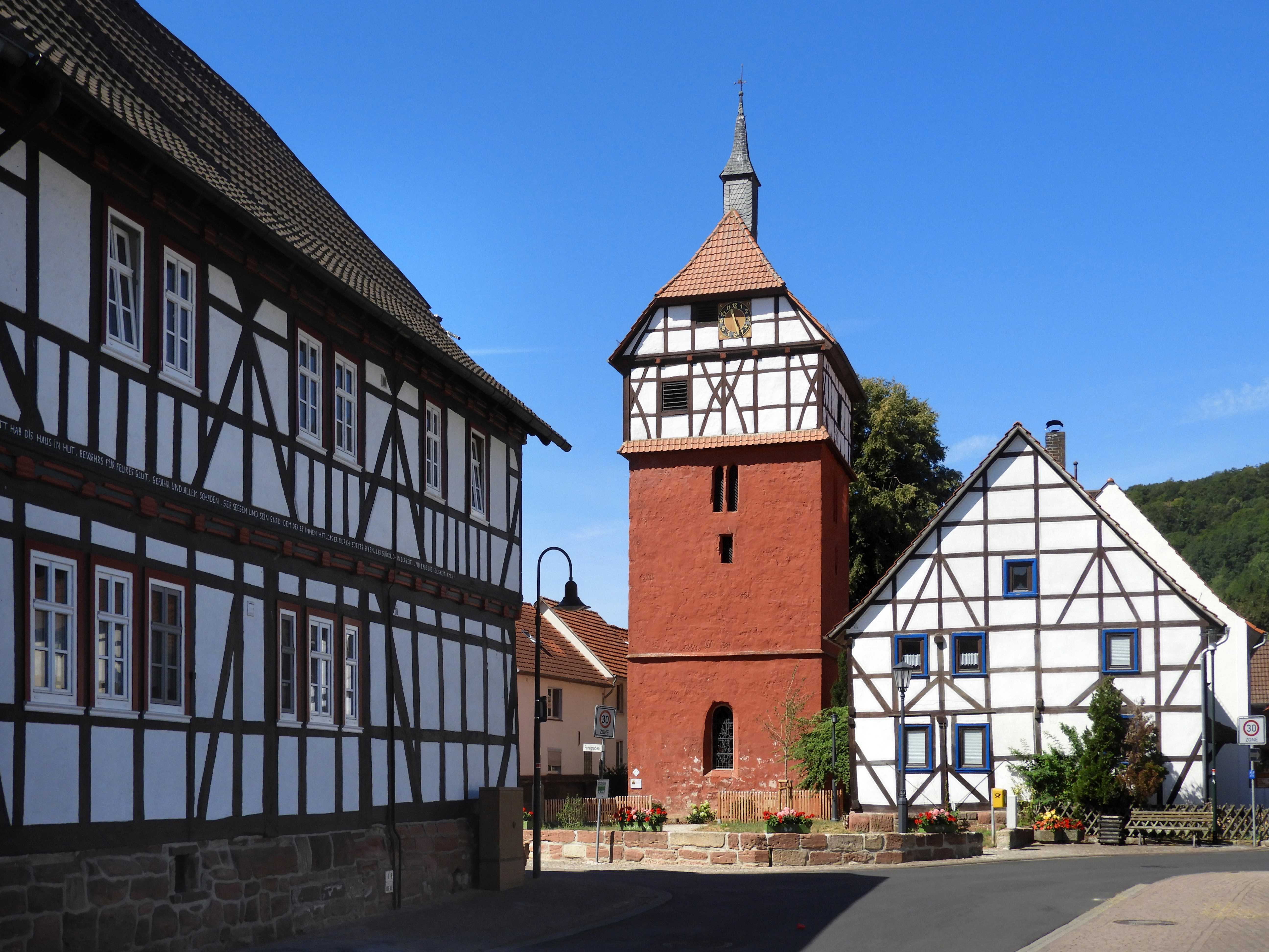 Der hochaufragende Chorturm der St. Martinskirche, mit seinen rund 23 Metern, ist das weit sichtbare Erkennungszeichen des Ortes. Er wurde in der ersten Hälfte des 14. Jahrhundert errichtet. Der aufgesetzte Fachwerkaufbau mit dem Walmdach und dem Dachreiter wird der Mitte des 17. Jahrhunderts zugeordnet. Wegen ihrer künstlerischen, geschichtlichen und städtebaulichen Bedeutung ist die Kirche ein geschütztes Kulturdenkmal. Hoheneiche ist ein Ortsteil der Gemeinde Wehretal im nordhessischen Werra-Meißner-Kreis.